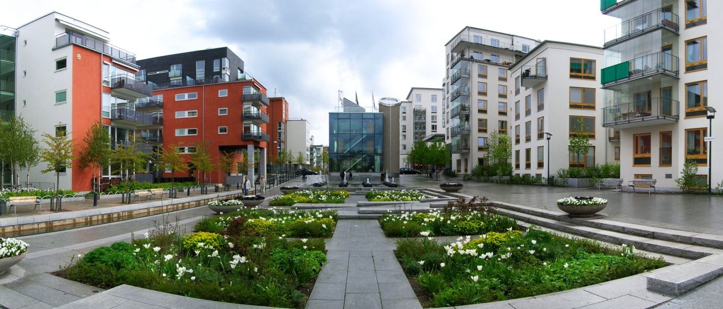 Hammarby Sjöstad, Stadsparterren